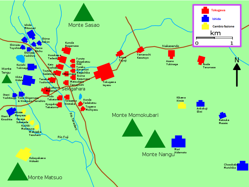 Schieramenti sul campo di battaglia